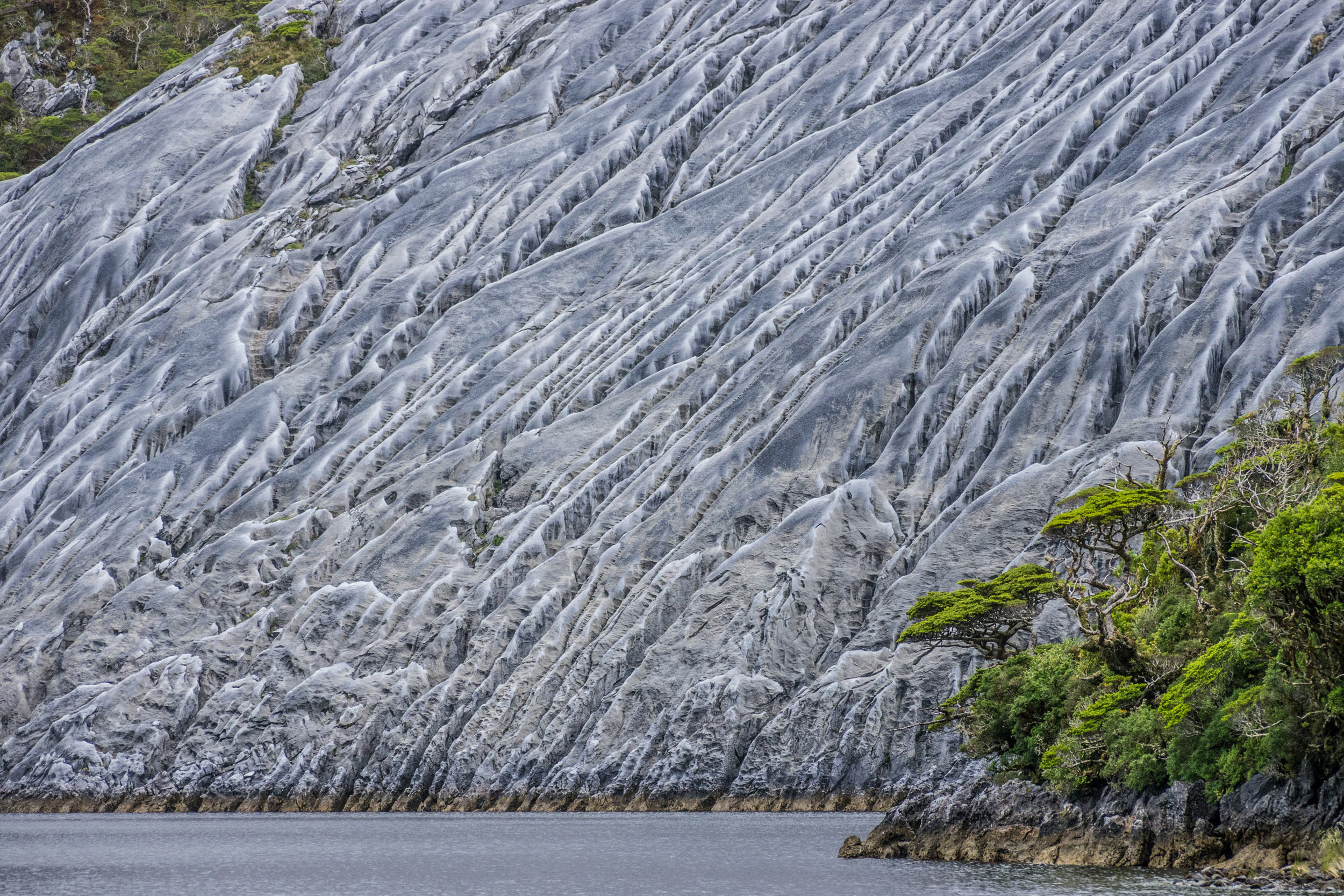 Les cannelures d'érosion karstique sur le seno Huemul, sur l'île Diedo de Almagro sont spectaculaires.